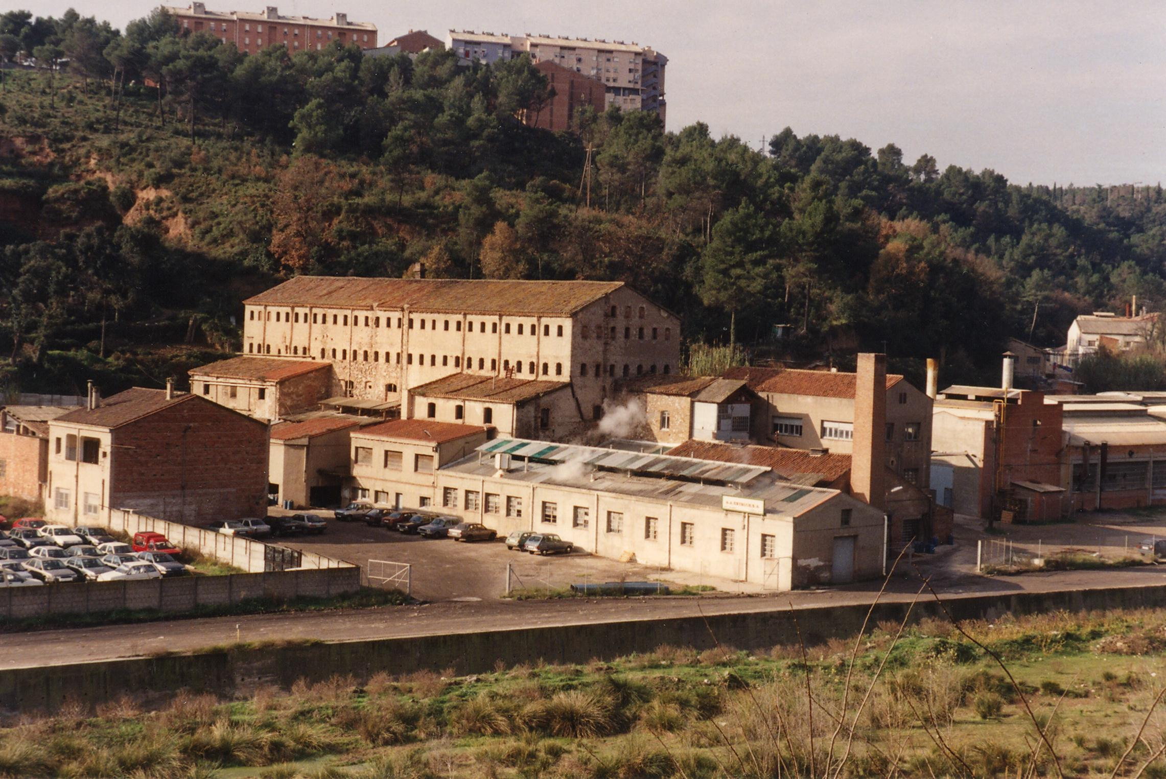 Molí d'en Mornau. Sabadell. Lluís Fernàndez